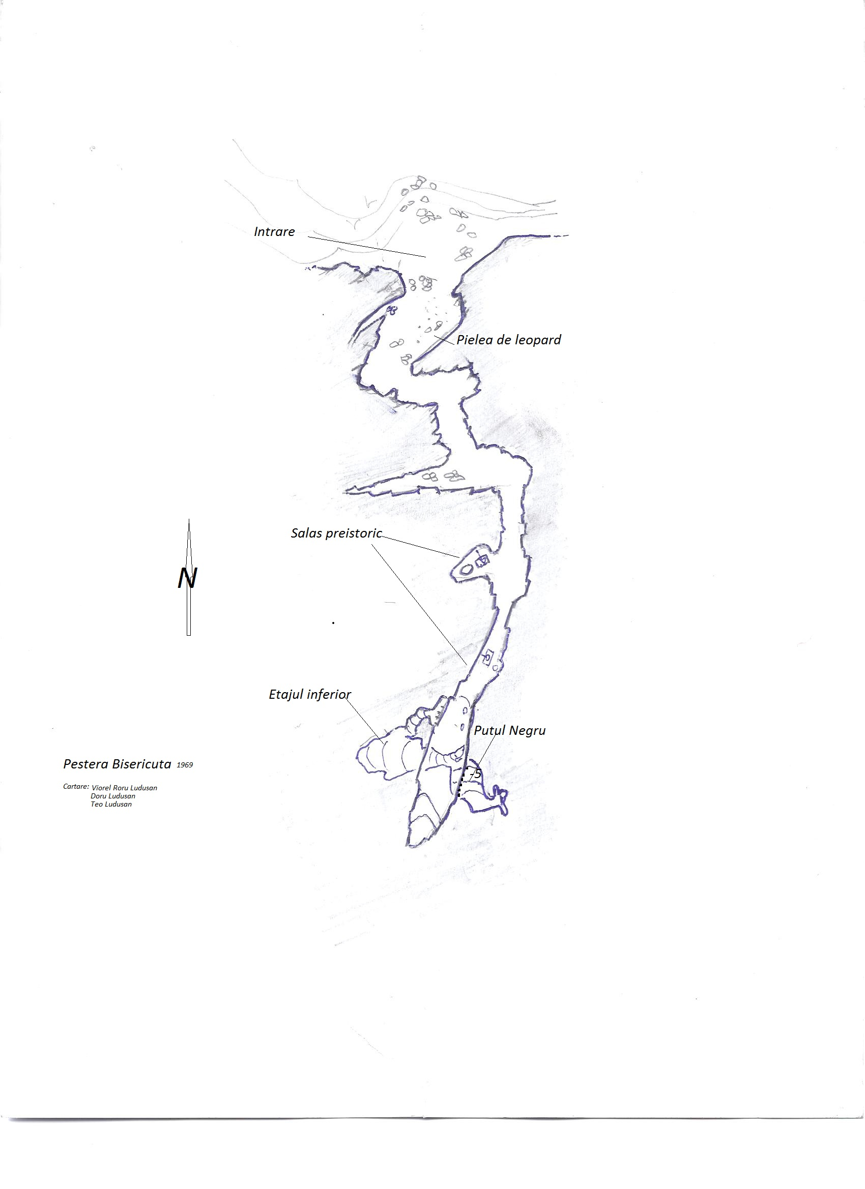 Cave Bisericuta map